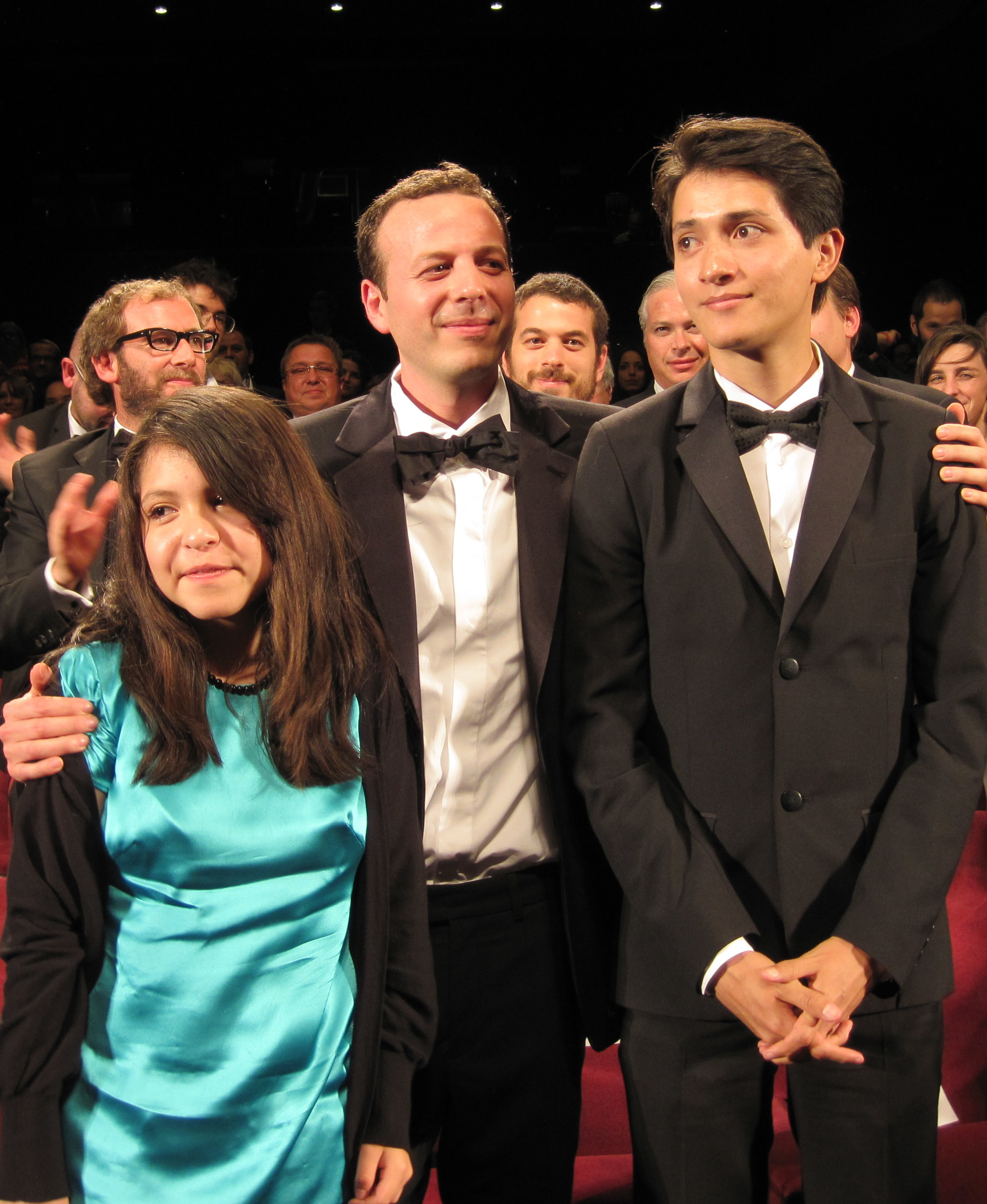 Andrea Vergara, Amat Escalante, Armando Espitia